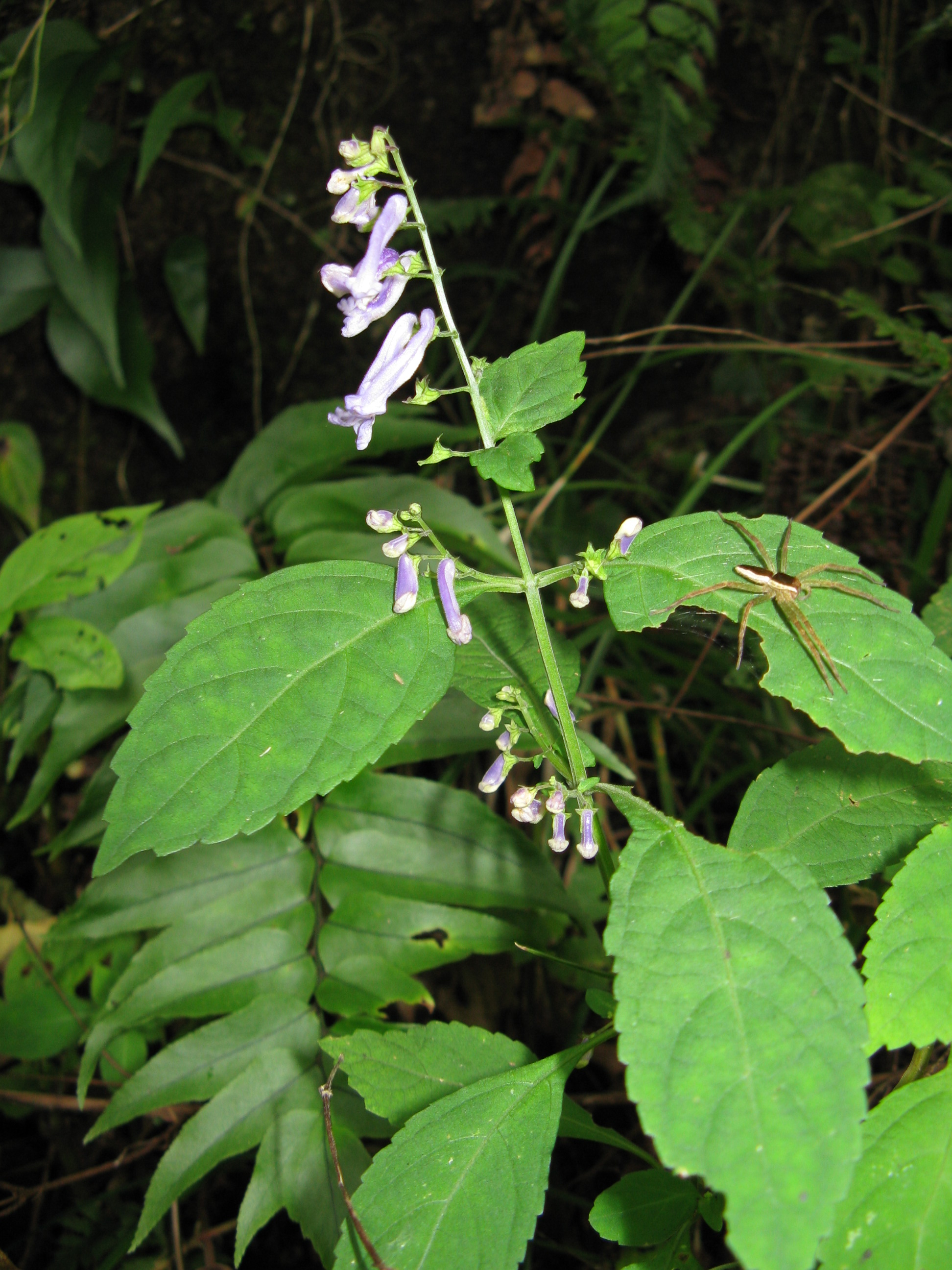 Scientific name Isodon longitubus